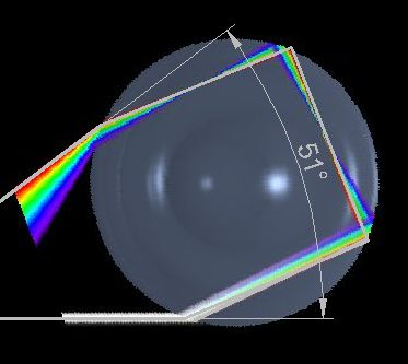 Lichtstrahl, der einen Wassertropfen durchläuft; gezeichnet sind nur die Lichtanteile, die nach zweimaliger innerer Reflexion und zweimaliger Brechung (je 1× beim Ein- und beim Austritt) den Tropfen farbig (dispergiert) verlassen.